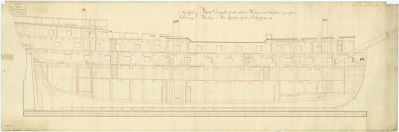 Чертёж 74-пушечного корабля HMS Courageux, выполненный Джоном Генсло в 1797 году.